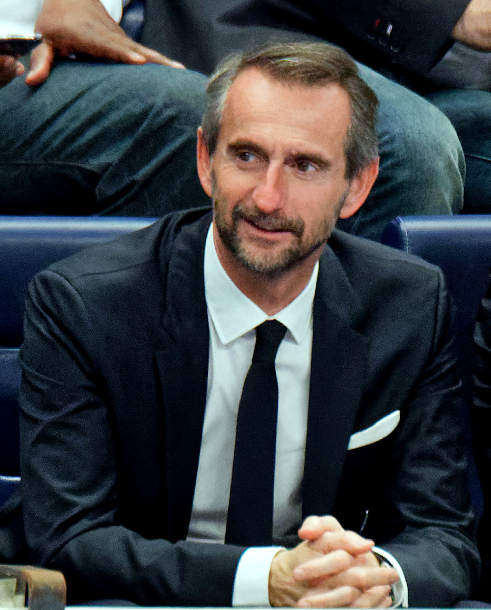 Jean-Claude Blanc, directeur général délégué du PSG. Ici lors de la rencontre de LNH entre le PSG et l'US CRéteil. A Coubertin, le 25 novembre 2015.